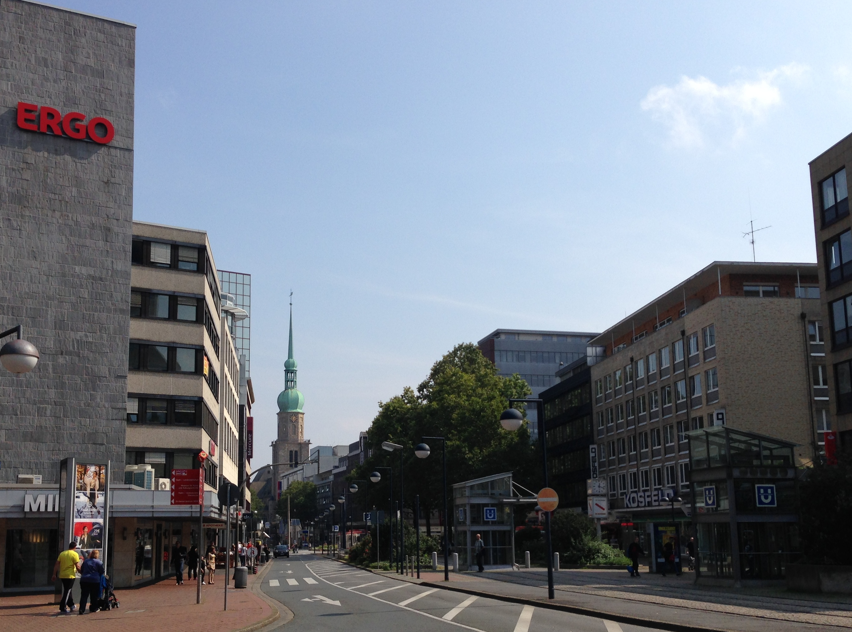 Reinoldikirche am Boulevard Kampstraße; Dortmund This is a photograph of an architectural monument. 0082